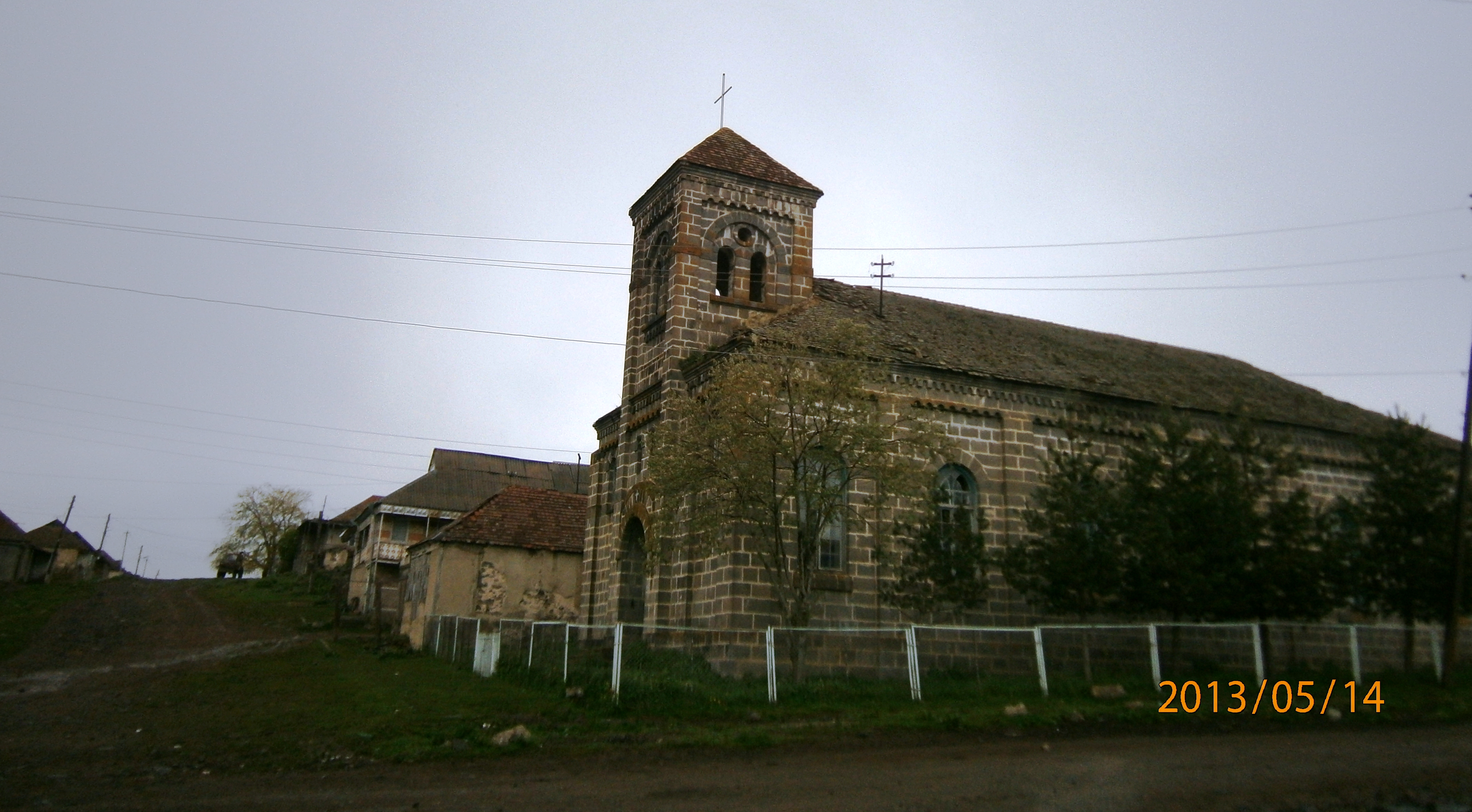 გერმანული ეკლესია სოფ. თრიალეთში.